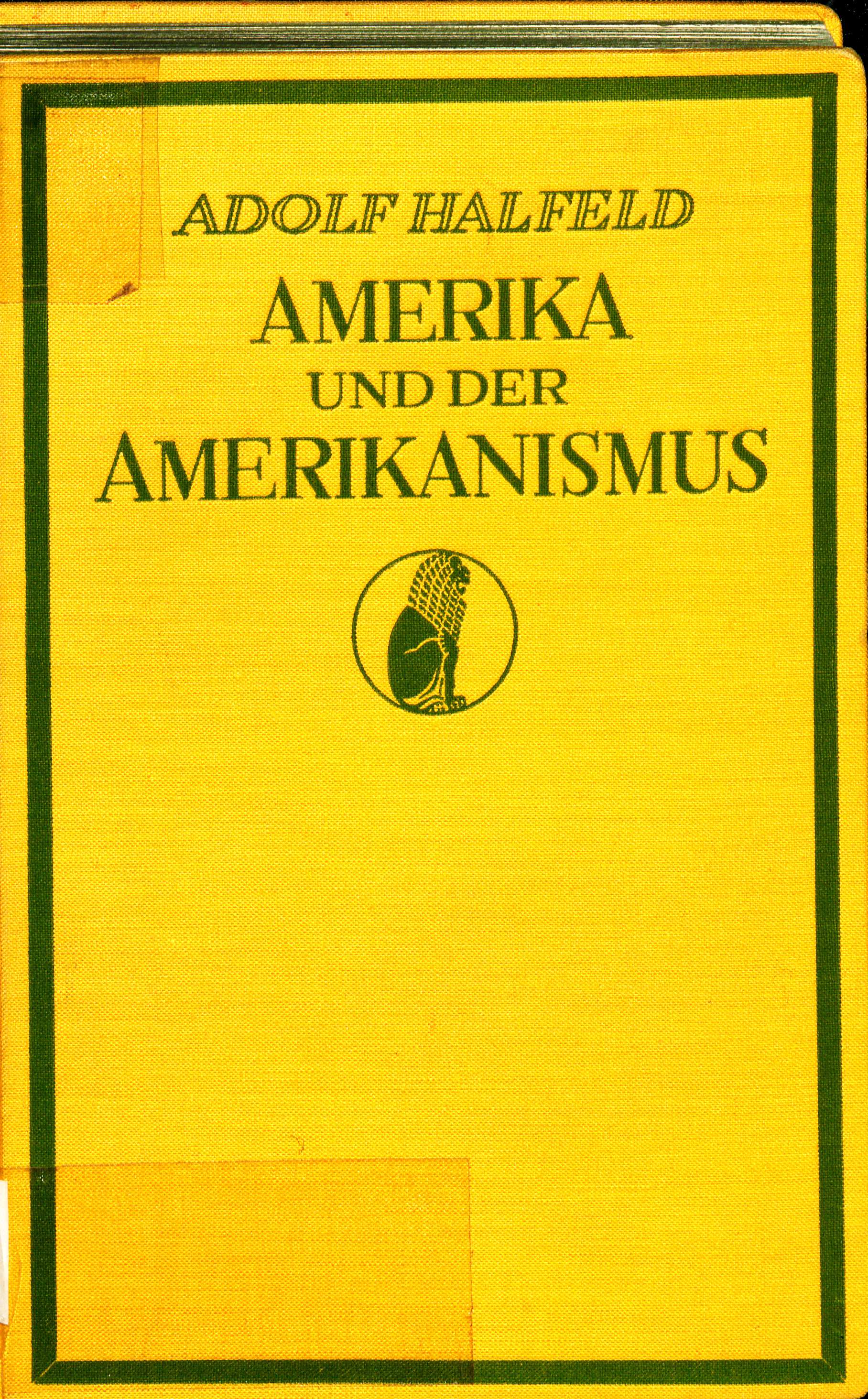 Adolf Halfeld Amerika und der Amerikanismus. Jena : E. Diederichs, 1927 , hier Auflage 1928 Einband. Einbandzeichnung Max Thalmann